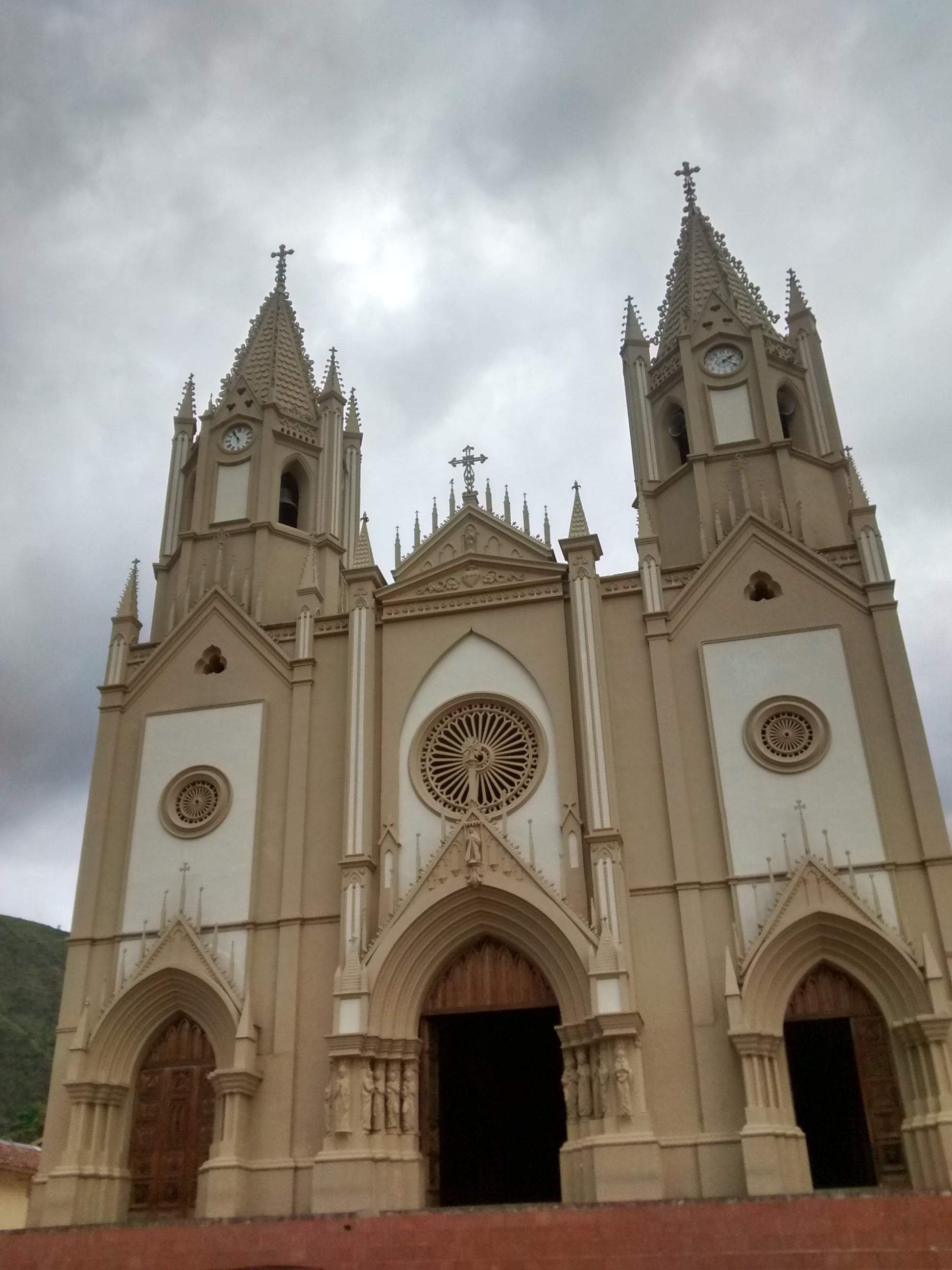 Iglesia en Colombia